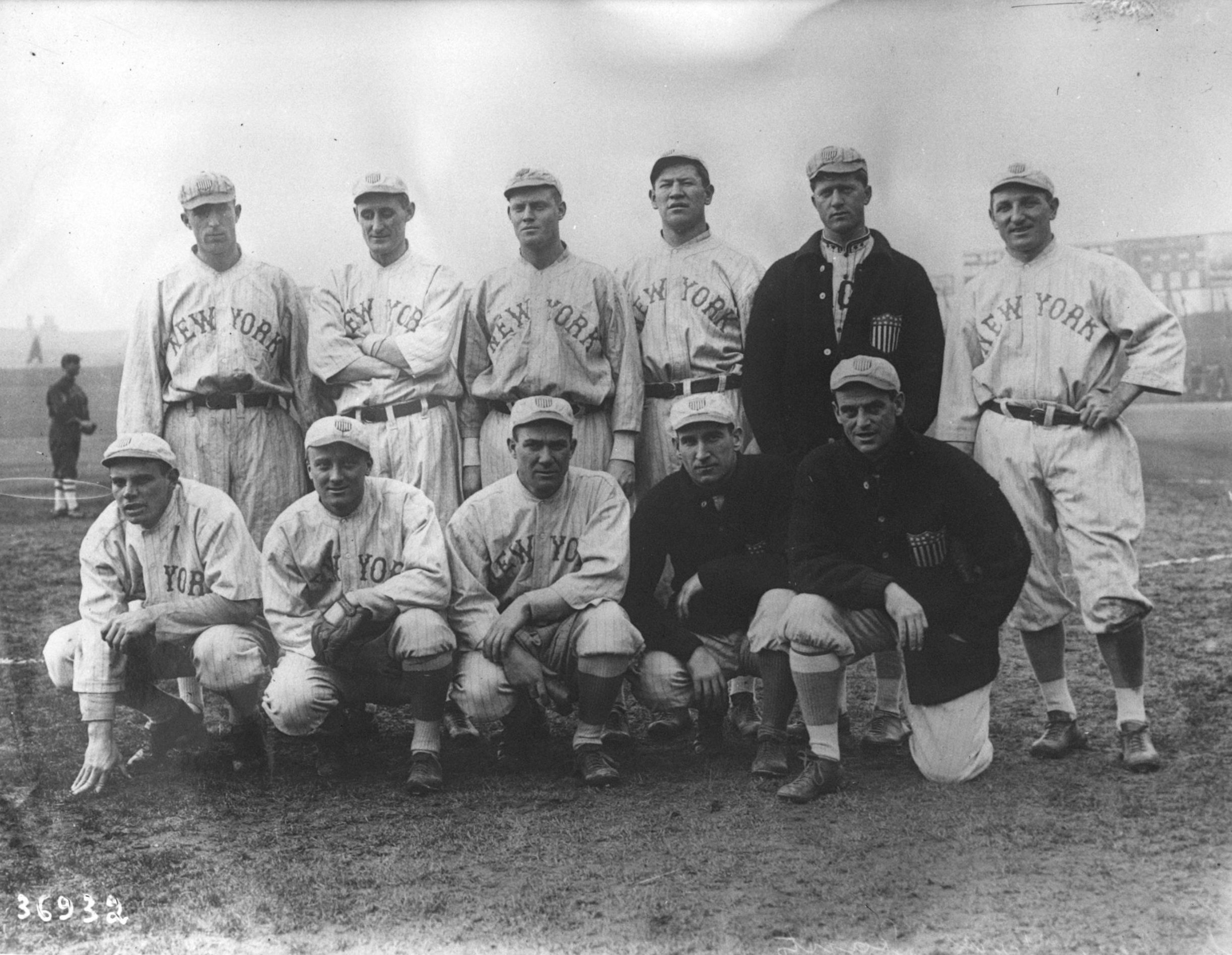 Les New York Giants, équipe américaine de baseball en tournée à Paris en février 1914 Ce cliché de 1914 ne porte pas de mention sur l'identité du photographe mais seulement le nom de l'agence de photo : "Rol". C'est donc un cliché dit "anonyme" qui tombe dans le domaine public en France 70 ans après sa publication. Voir aussi Conditions d'utilisations des clichés de